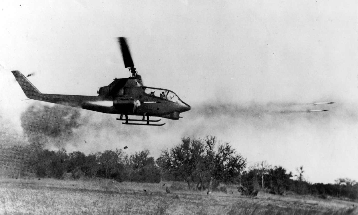 An AH-1 Cobra firing rockets at an enemy target in Vietnam.